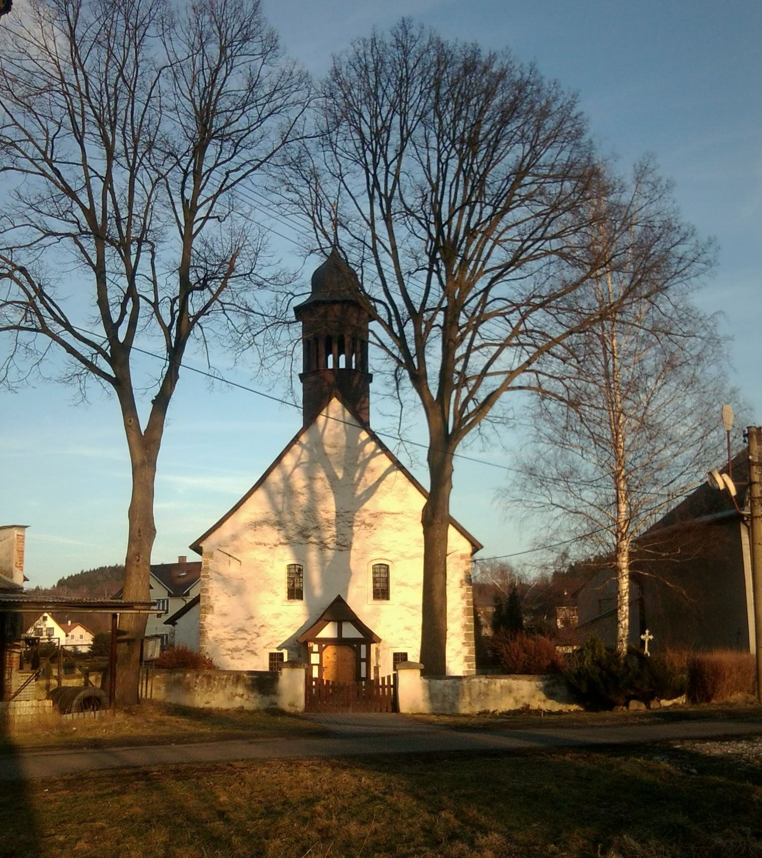 Kostel sv. archanděla Michaela v Nové Roli